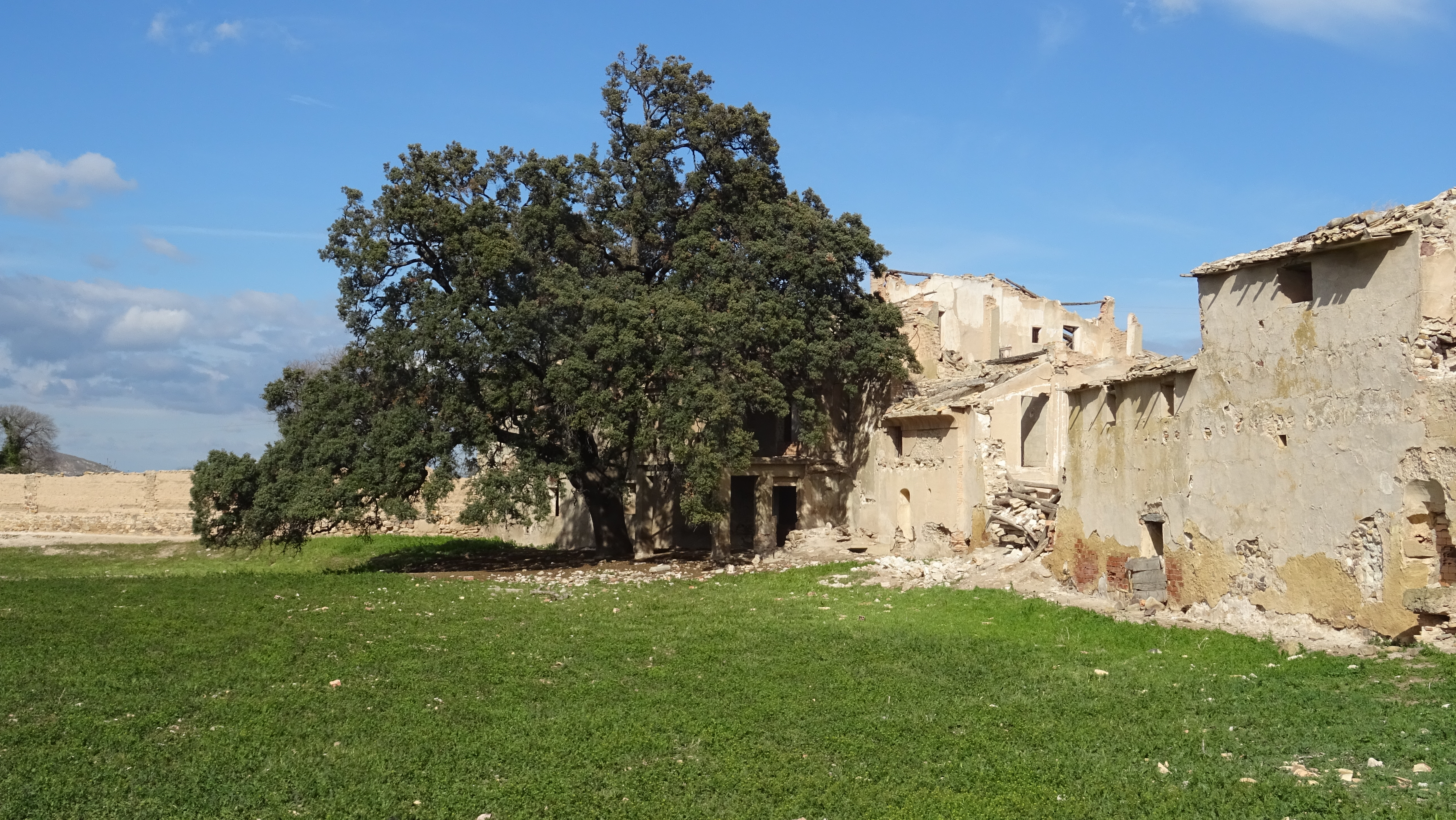 Aragonés: carrasca de Ganyarul y a casa d'o sinyor